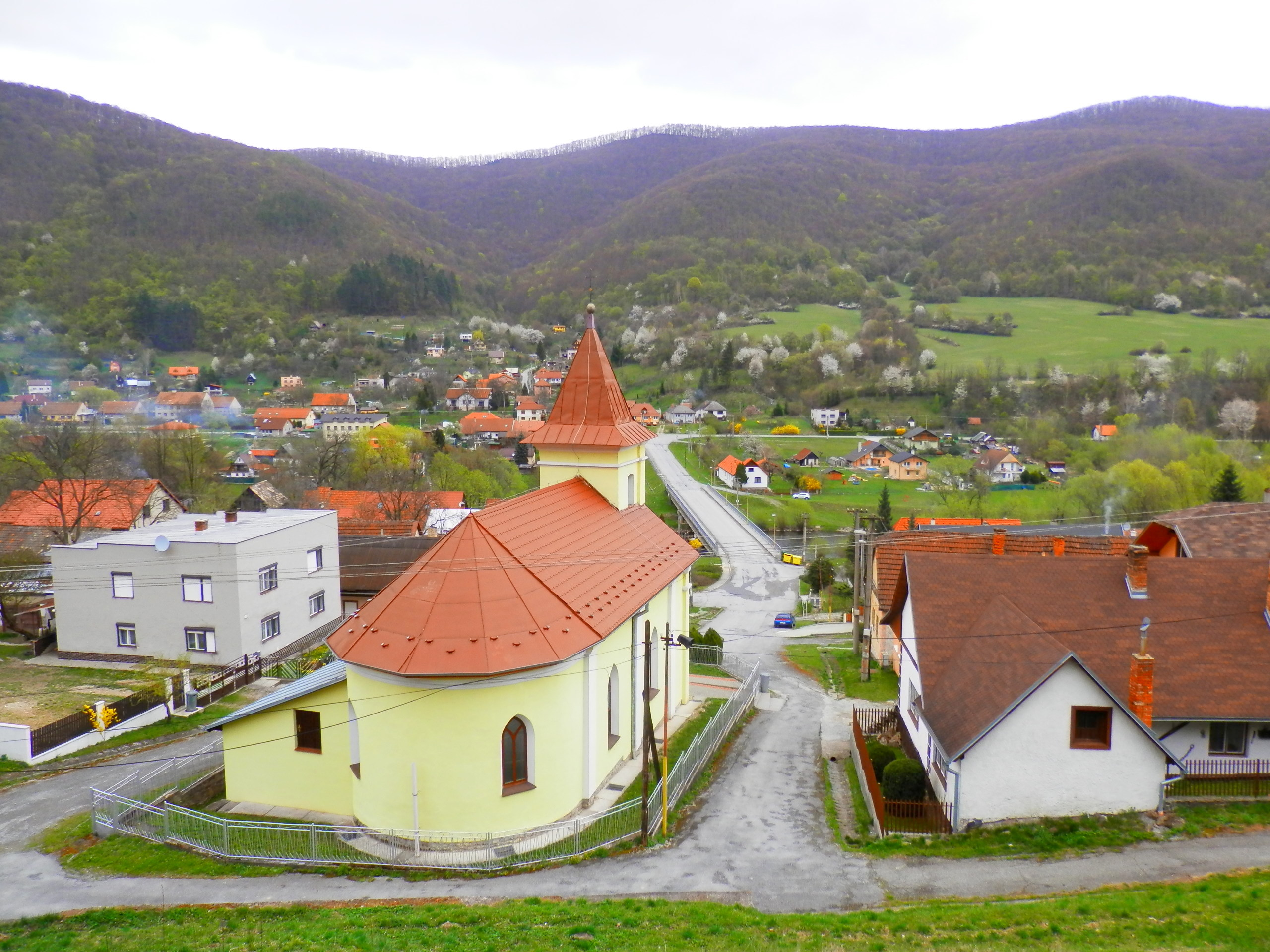 Kostol. Obec Malá Lodina, okres Košice okolie.